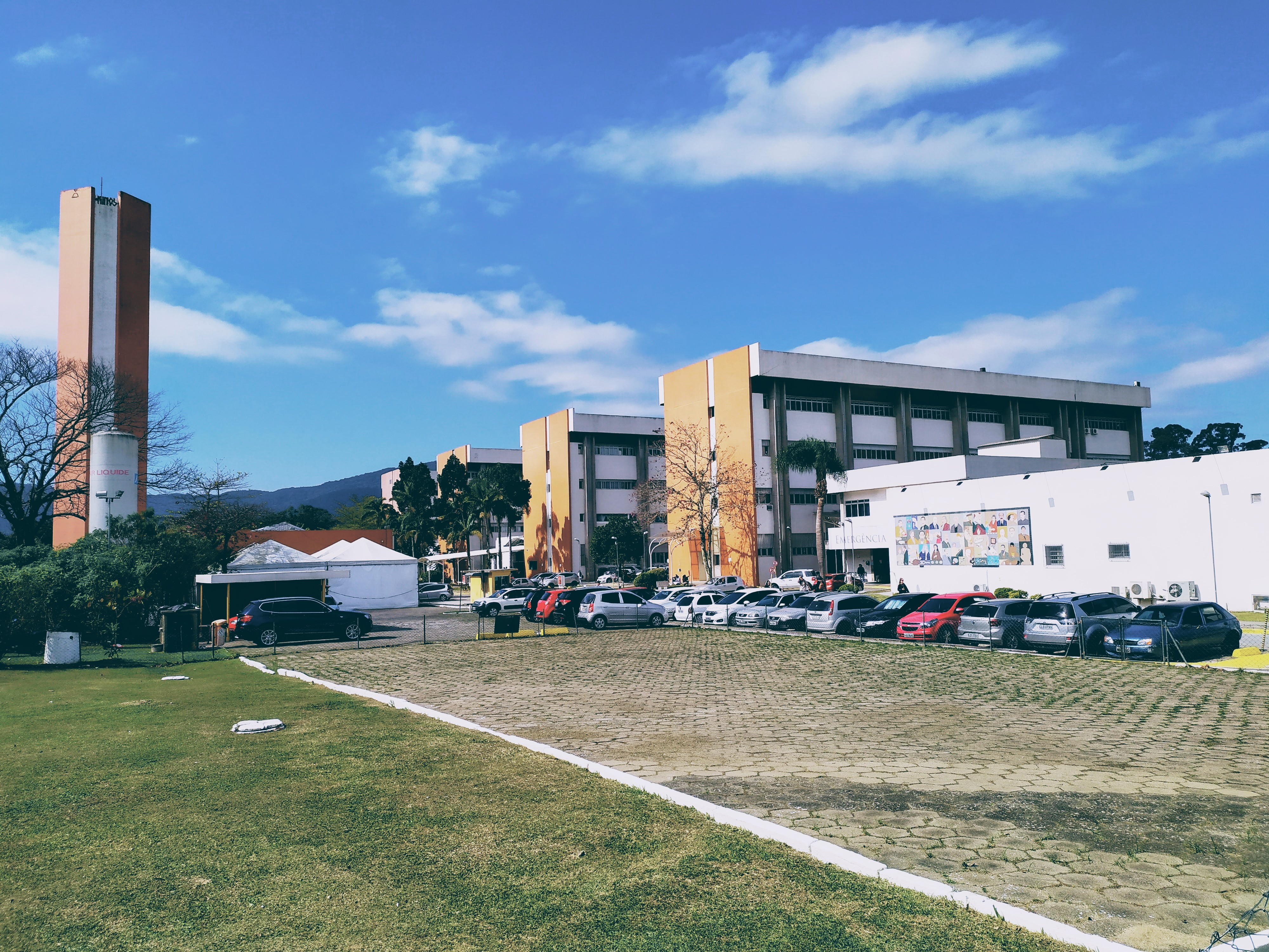 Hospital Universitário UFSC agosto 2019